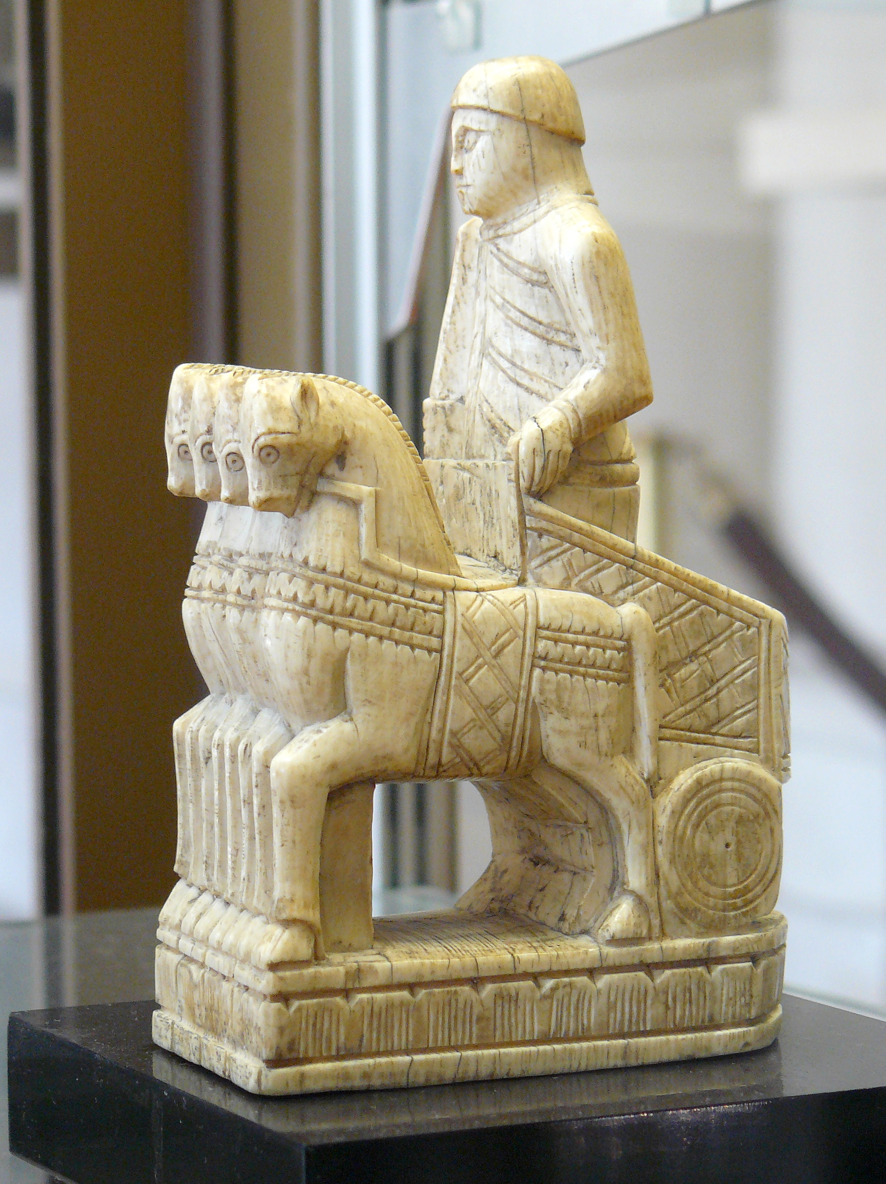 Échiquier dit de Charlemagne, quadrige (tour), ivoire d'éléphant, XIe siècle, Italie méridionale, trace de peinture, d'un ensemble de 16 pièces conservées dans le trésor de Saint-Denis - Hauteur environ 8 cm - Cabinet des médailles, Paris, n° Inv 305 à 323